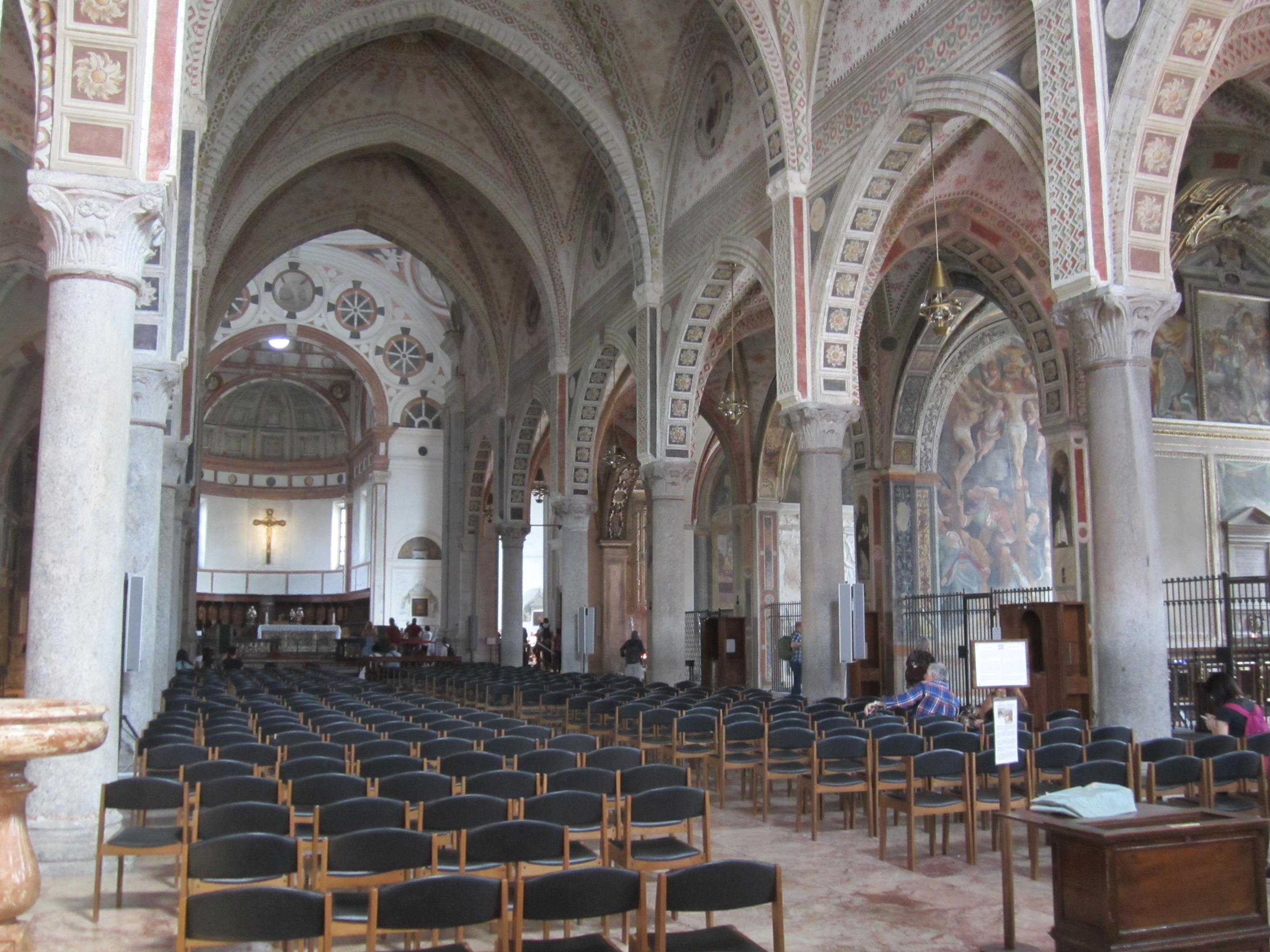 Interno della Chiesa di Santa Maria delle Grazie a Milano